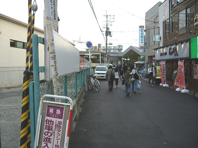 阪急電鉄 石橋駅 東口駅前